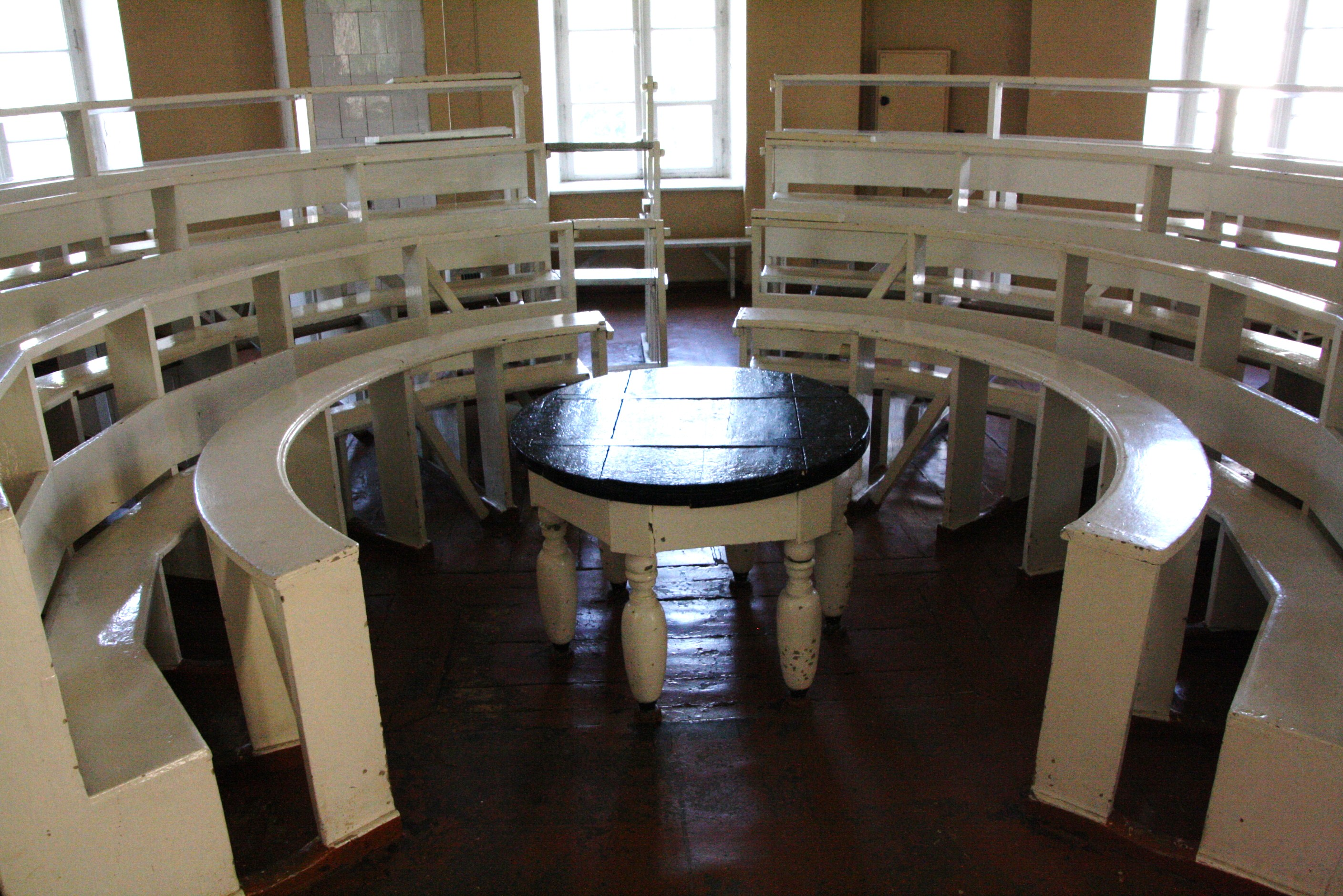 Tartu vana Anatoomikumi auditoorium